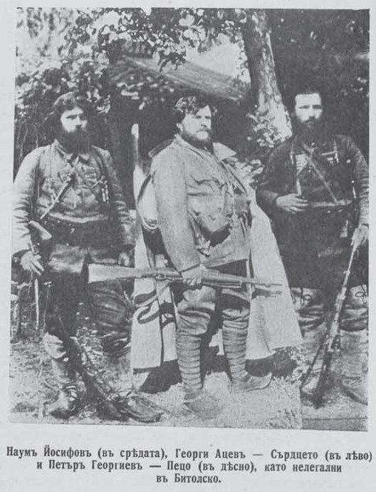 Chernopeev Chekov and Bozhkov